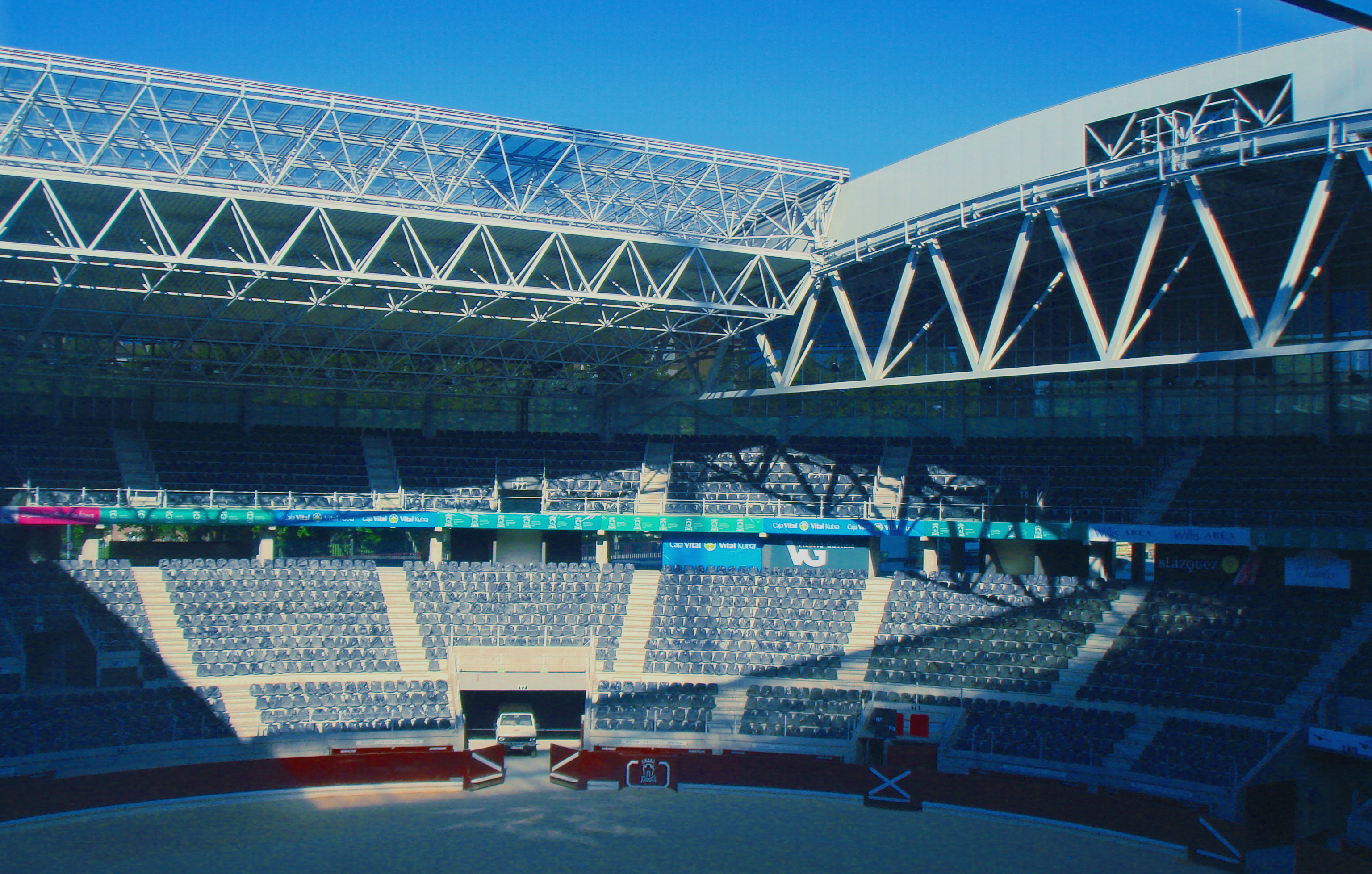 Vista interior nueva plaza de toros de Vitoria, España.